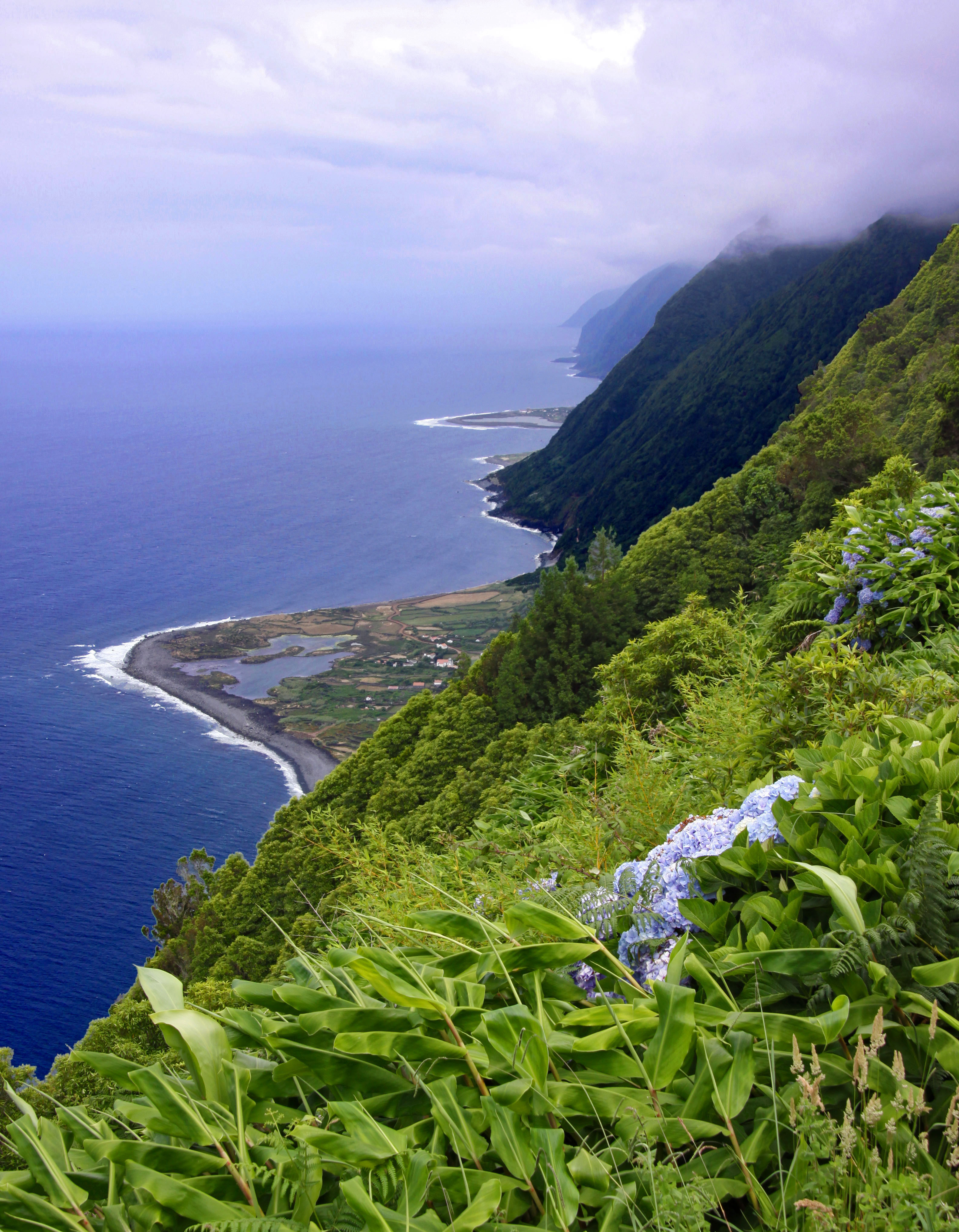 Ilha de São Jorge, Açores. Vue sur les fajãs dos Cubres et da Caldeira de Santo Cristo.